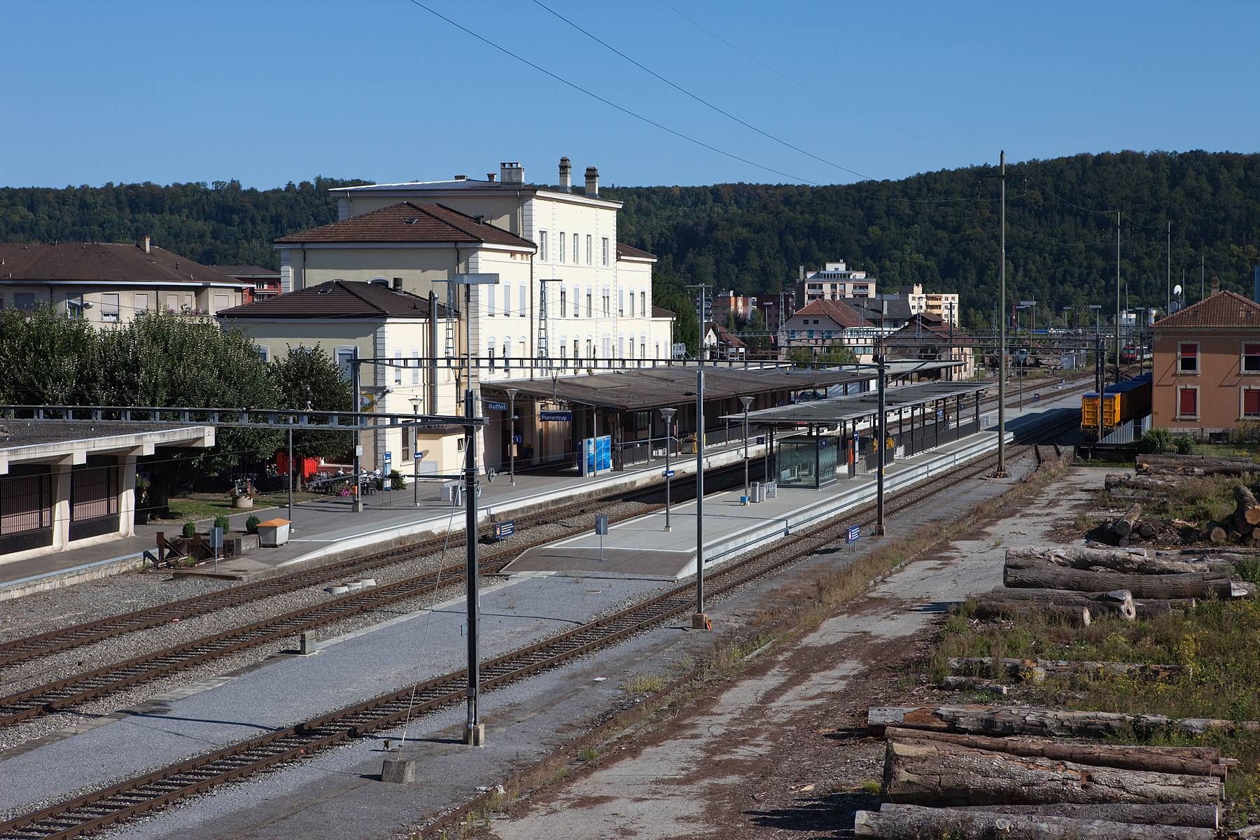 La Gare de Porrentruy (JU)